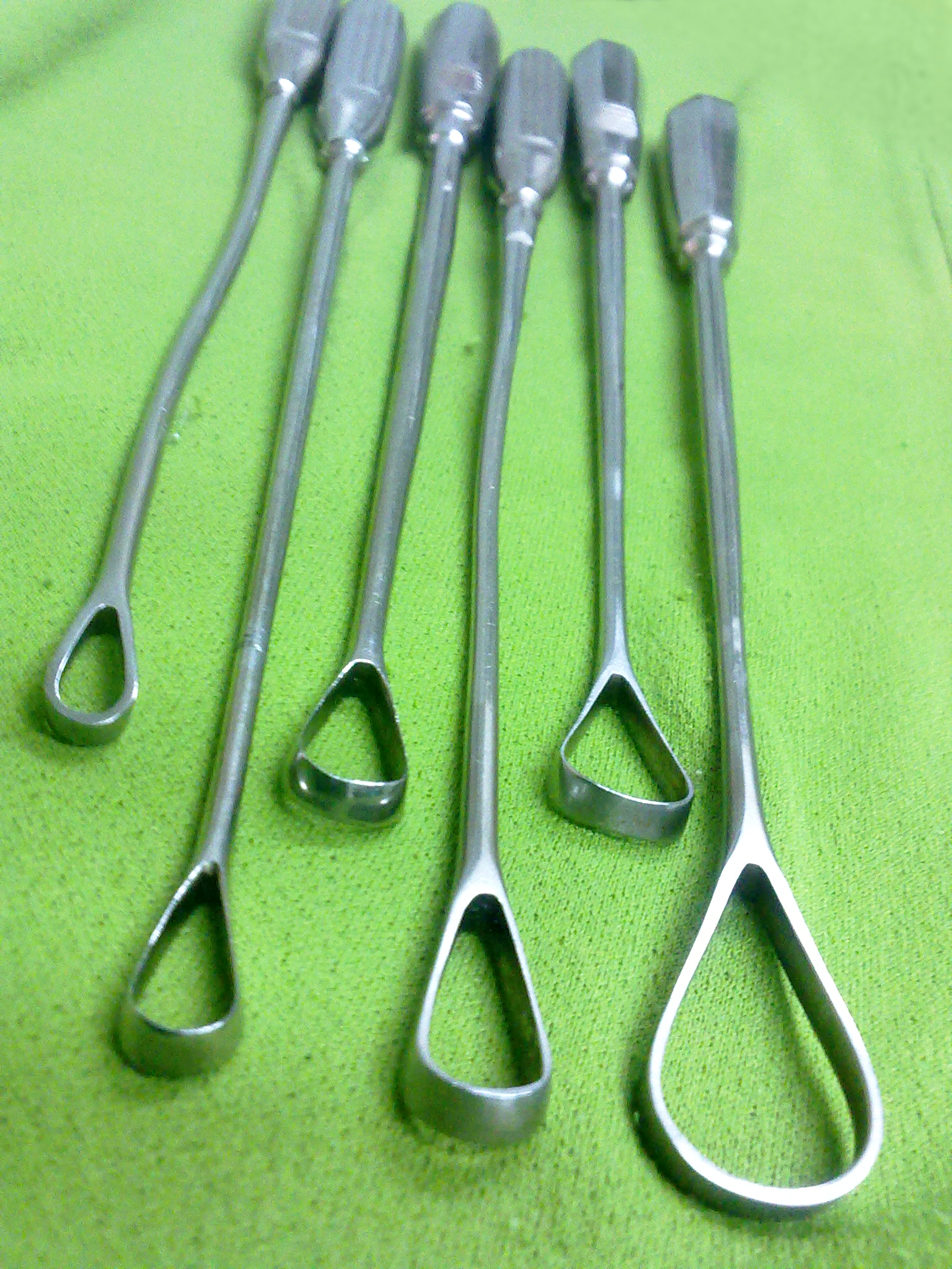 کورت رحمی : وسیله ای جهت تراشیدن آندومتر رحم و محتویات است . این وسیله بیشتر در ست کورتاژ دیده می‌شود . راس آن ممکن است کند یا تیز باشد .